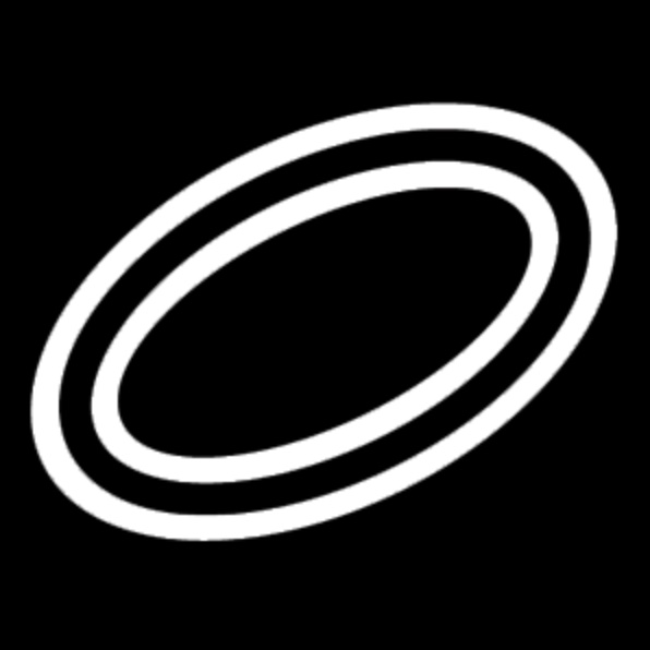 Symbole de signalisation routière français. SU4 - Indique une rocade.